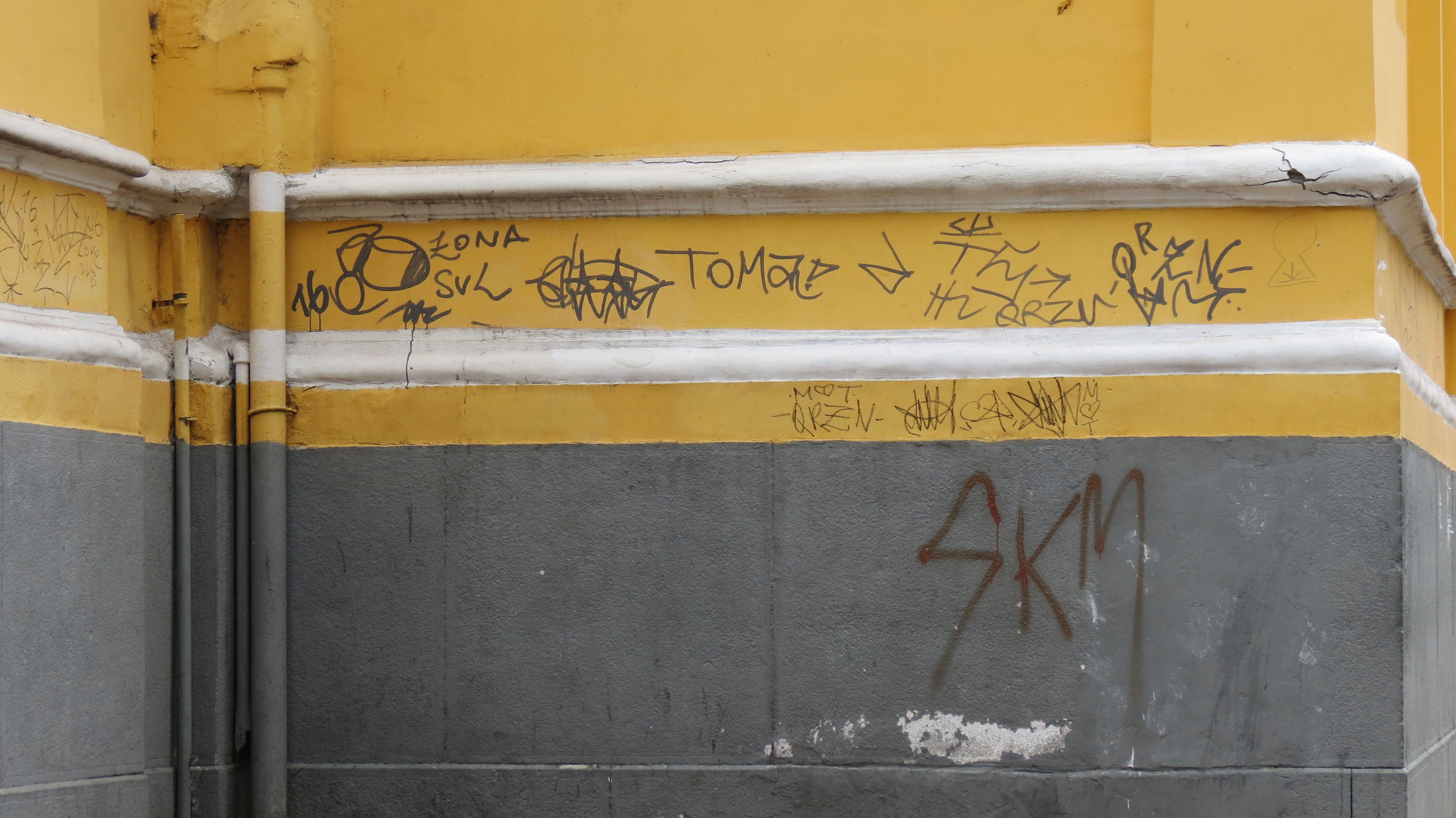 Vandalismo na área externa da Igreja Nossa Senhora do Rosário dos Homens Pretos, em São Paulo (SP), Brasil.